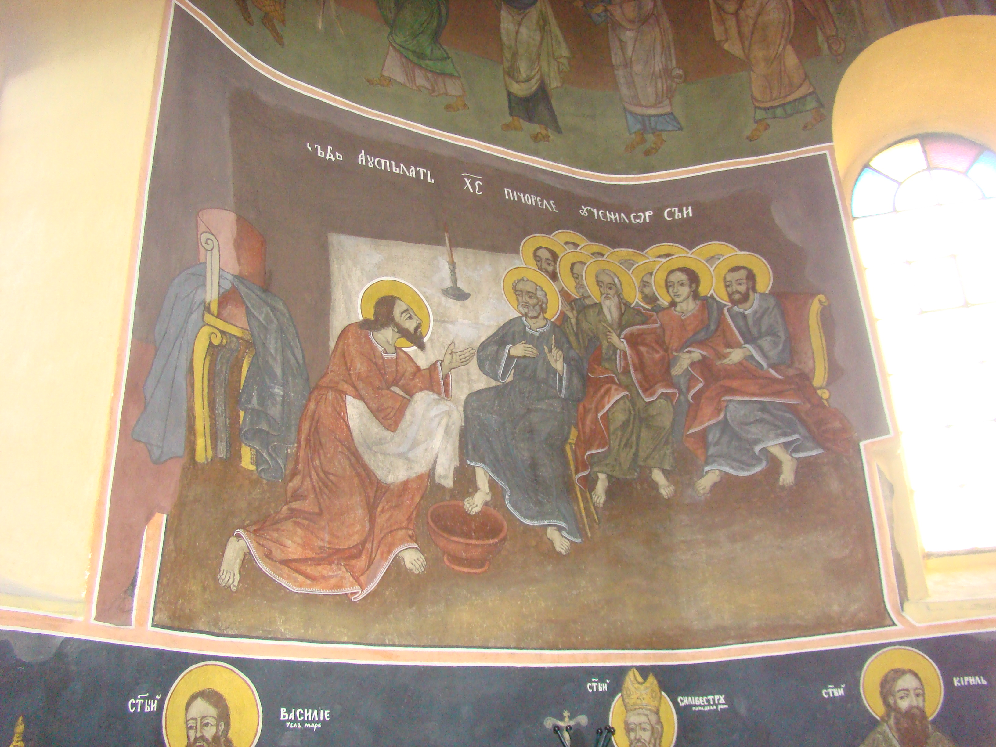 Biserica „Nașterea Născătoarei de Dumnezeu" din Hălmagiu, județul Arad